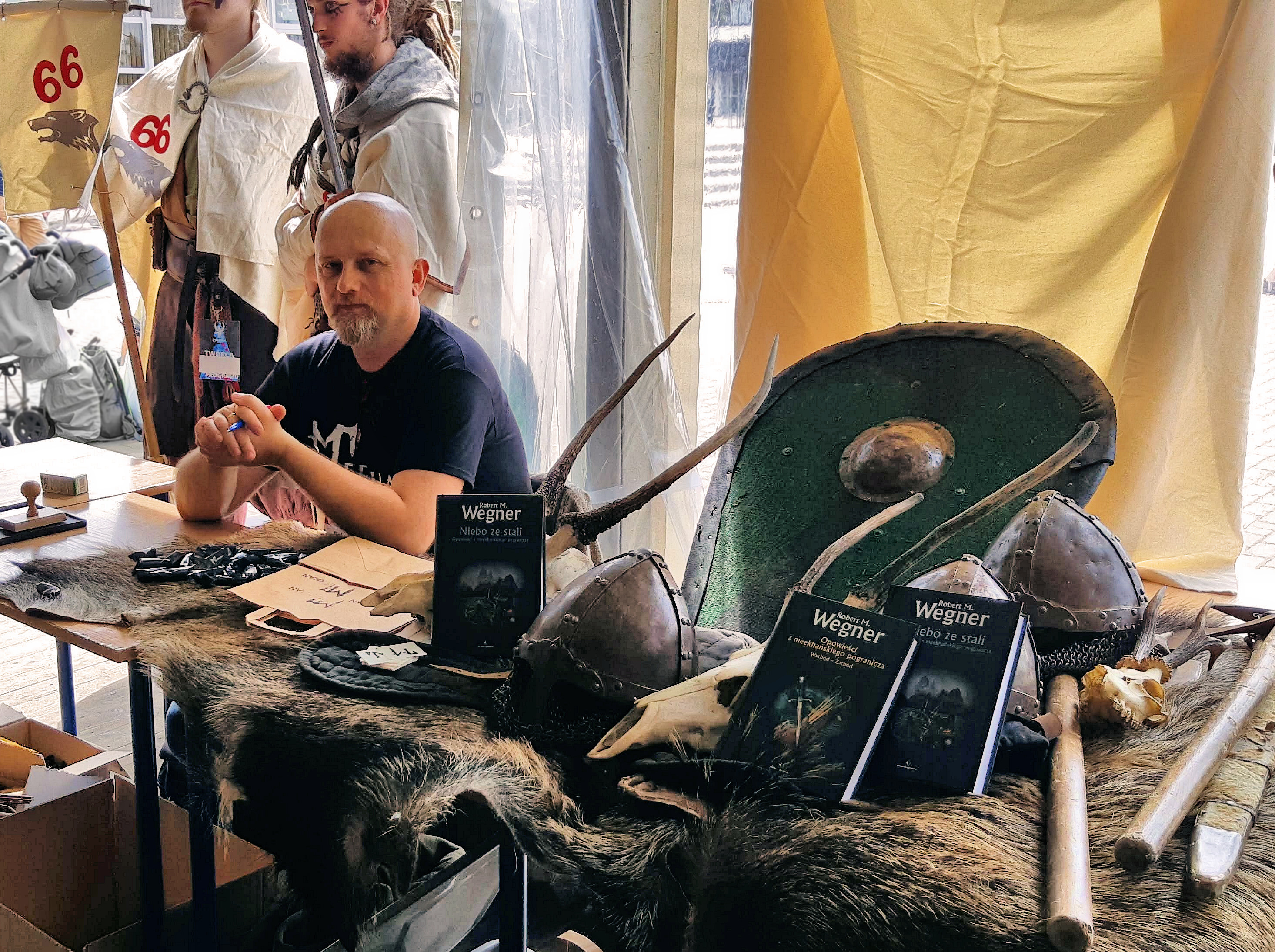 Robert M. Wegner na stoisku promującym "Opowieści z meekhańskiego pogranicza" (Meekhan), Polcon 2018 w Toruniu